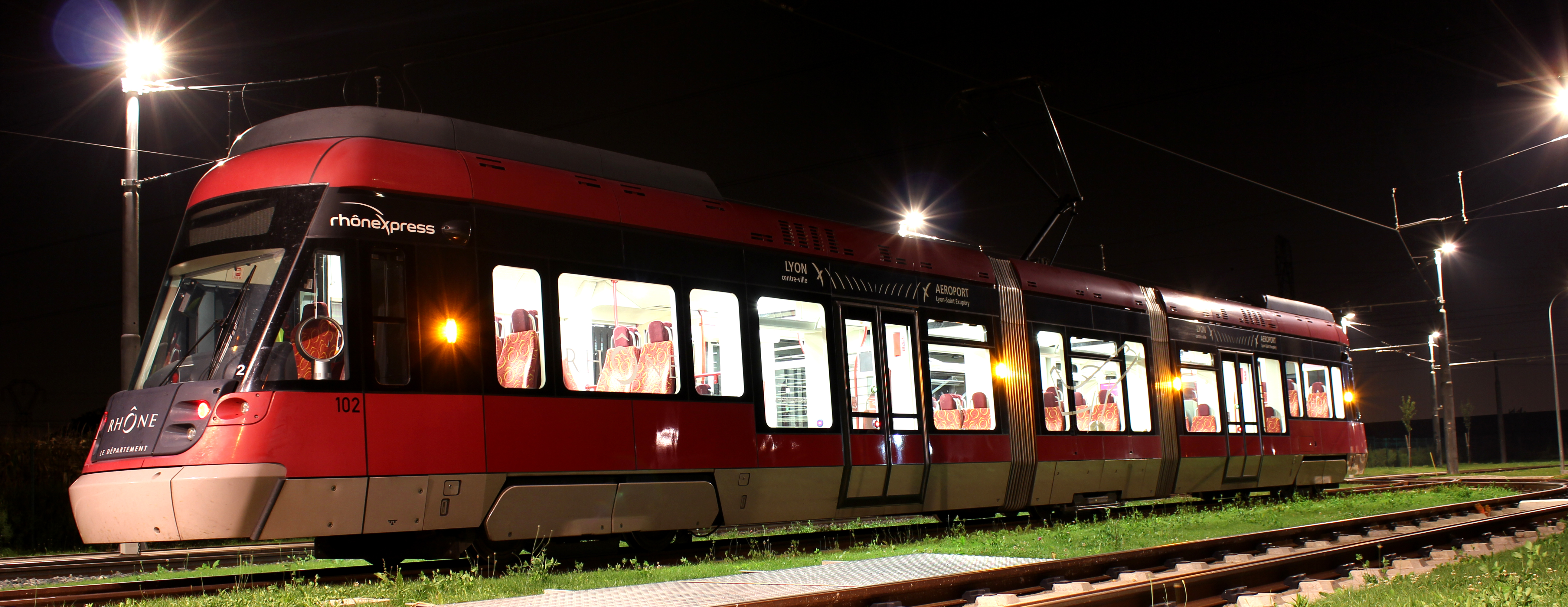 Rame numéro 102 de la ligne Rhônexpress, ici sur une voie d'atelier du dépôt.